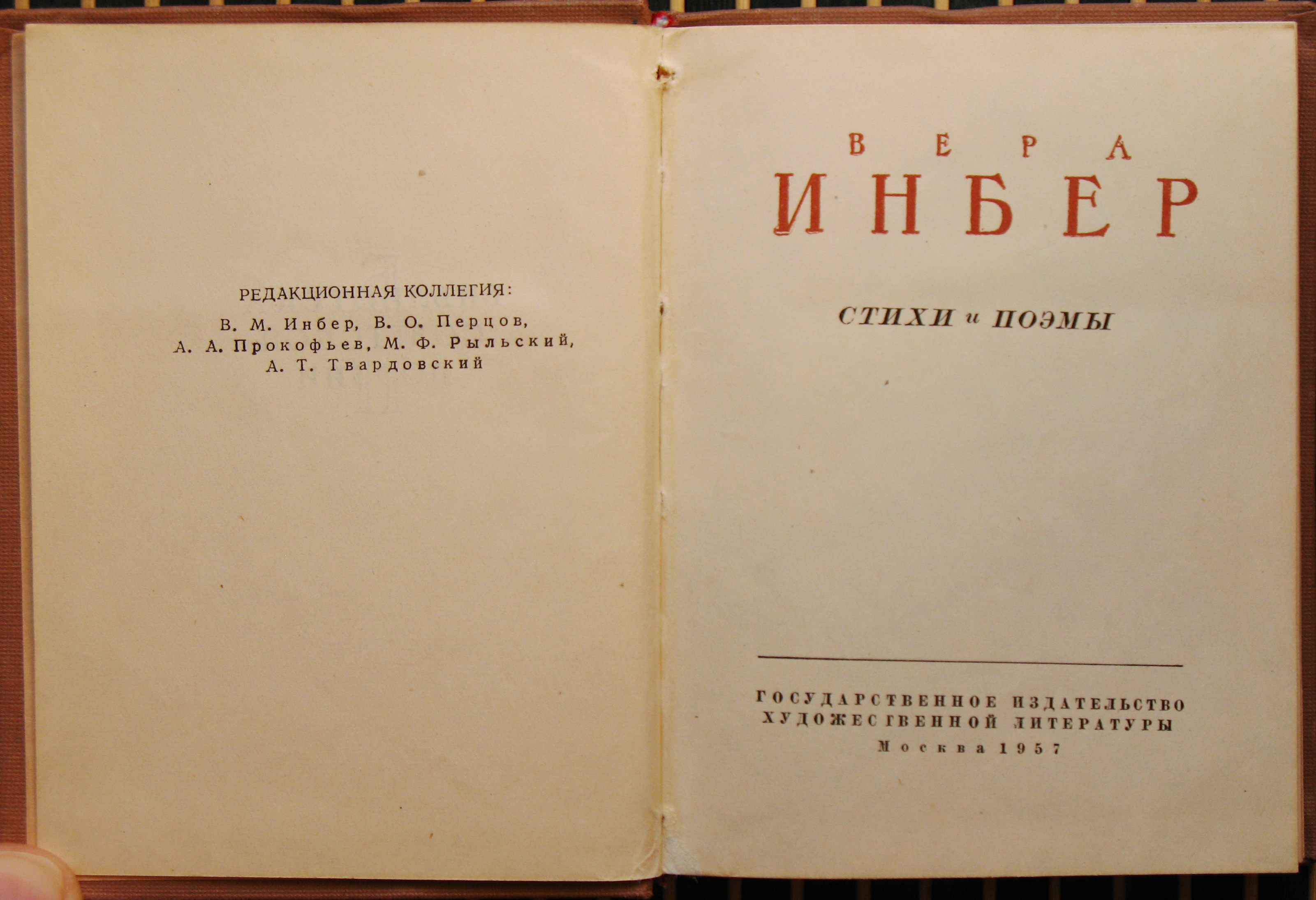 Vera Inber book.